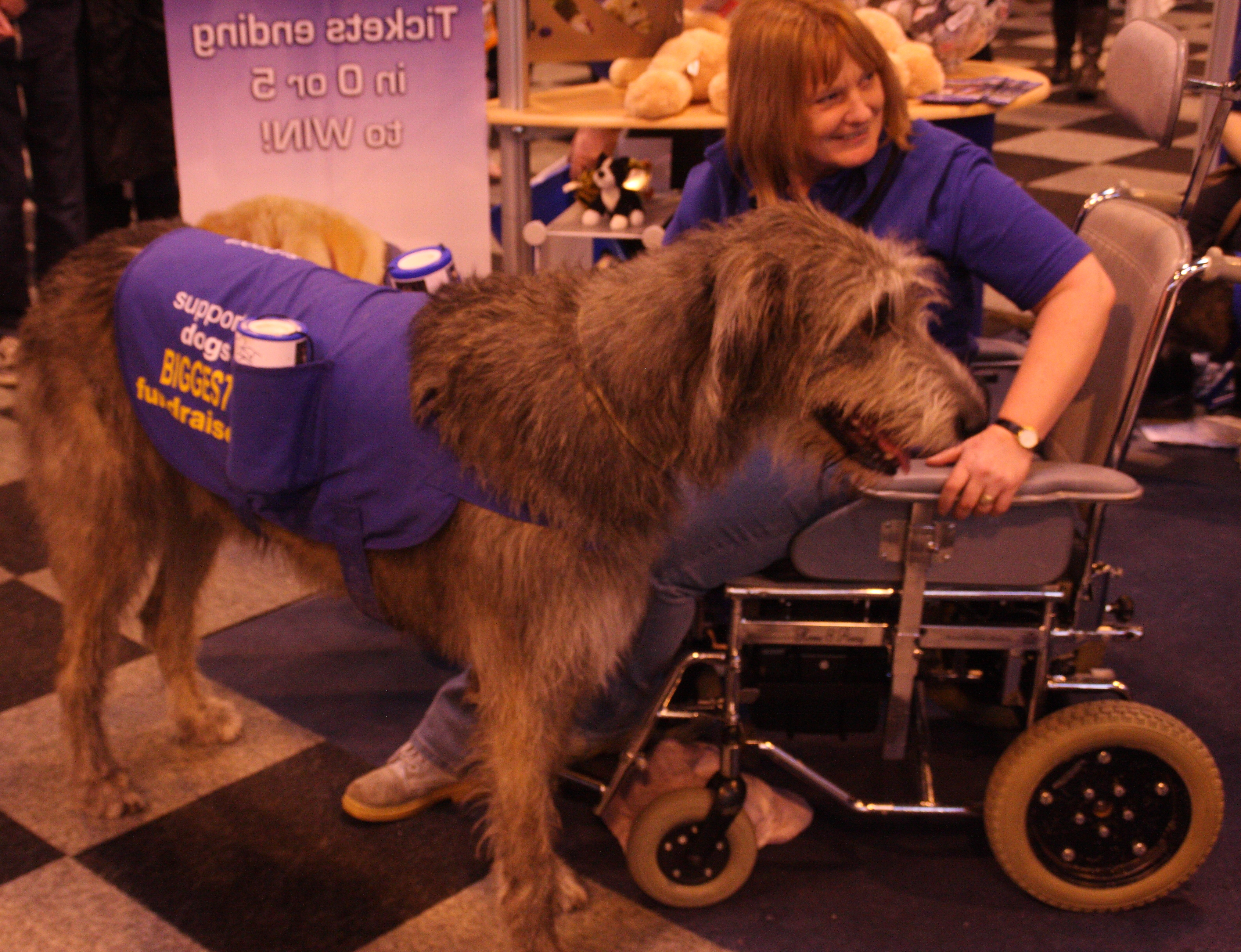 Support dogs display